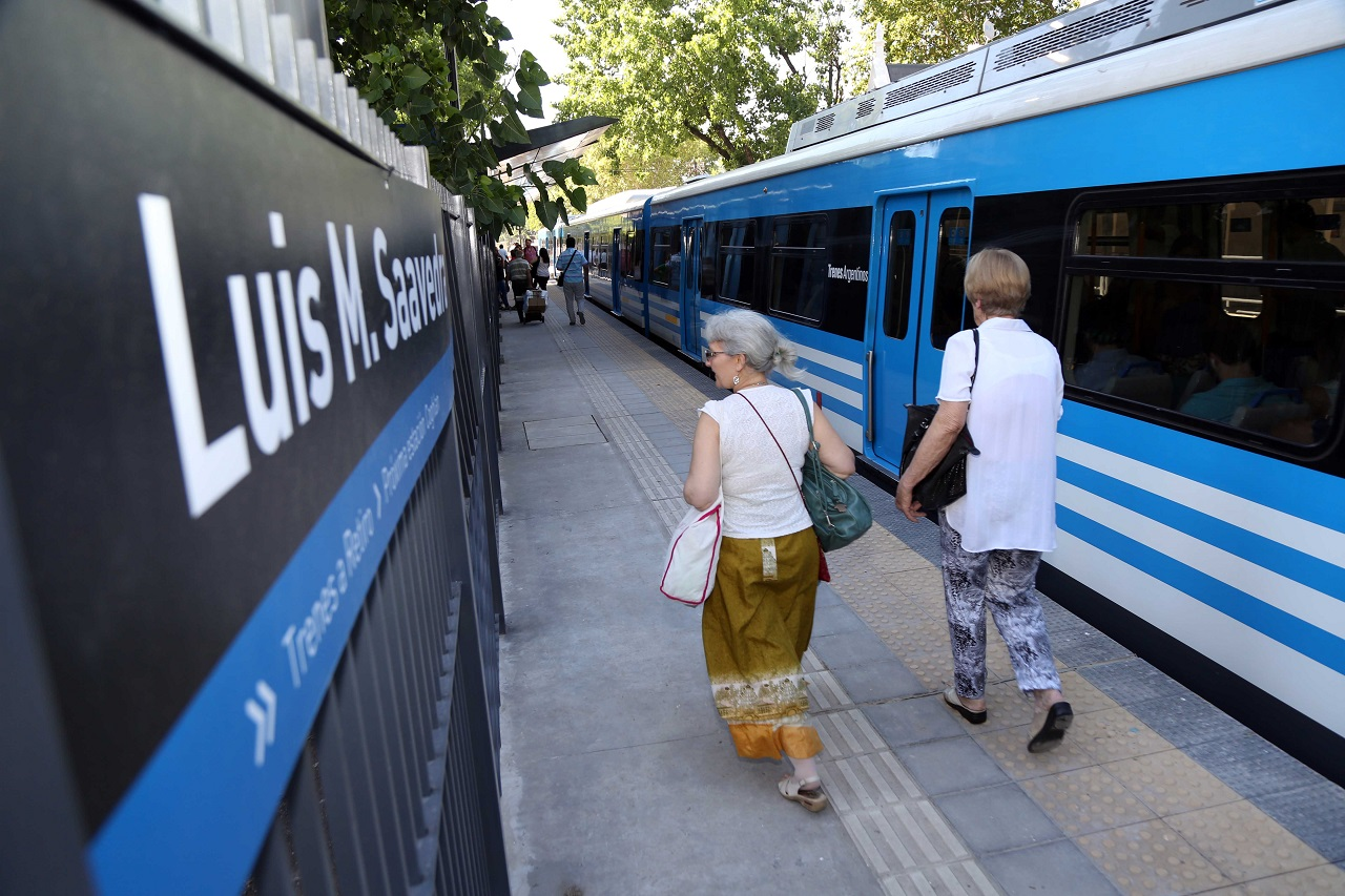 Estación Saavedra de la línea Mitre en diciembre de 2017.